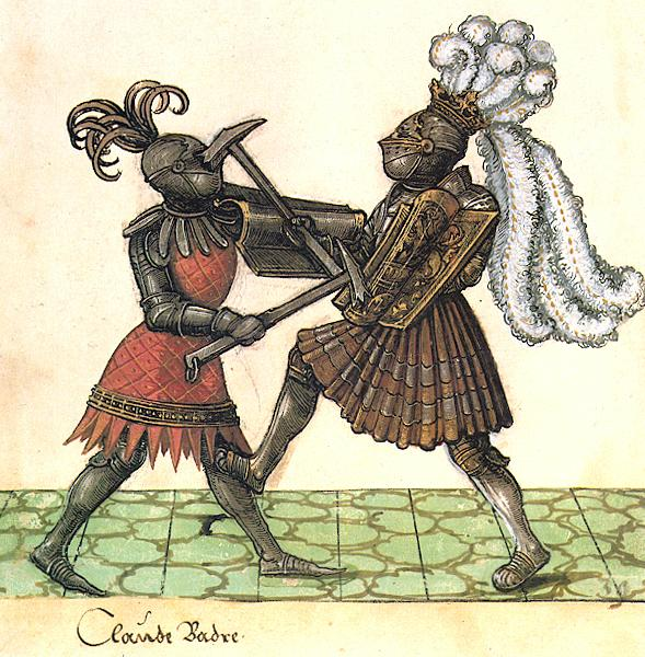 Seite aus dem Turnierbuch „Freydal“, KHM Wien, MS KK5073